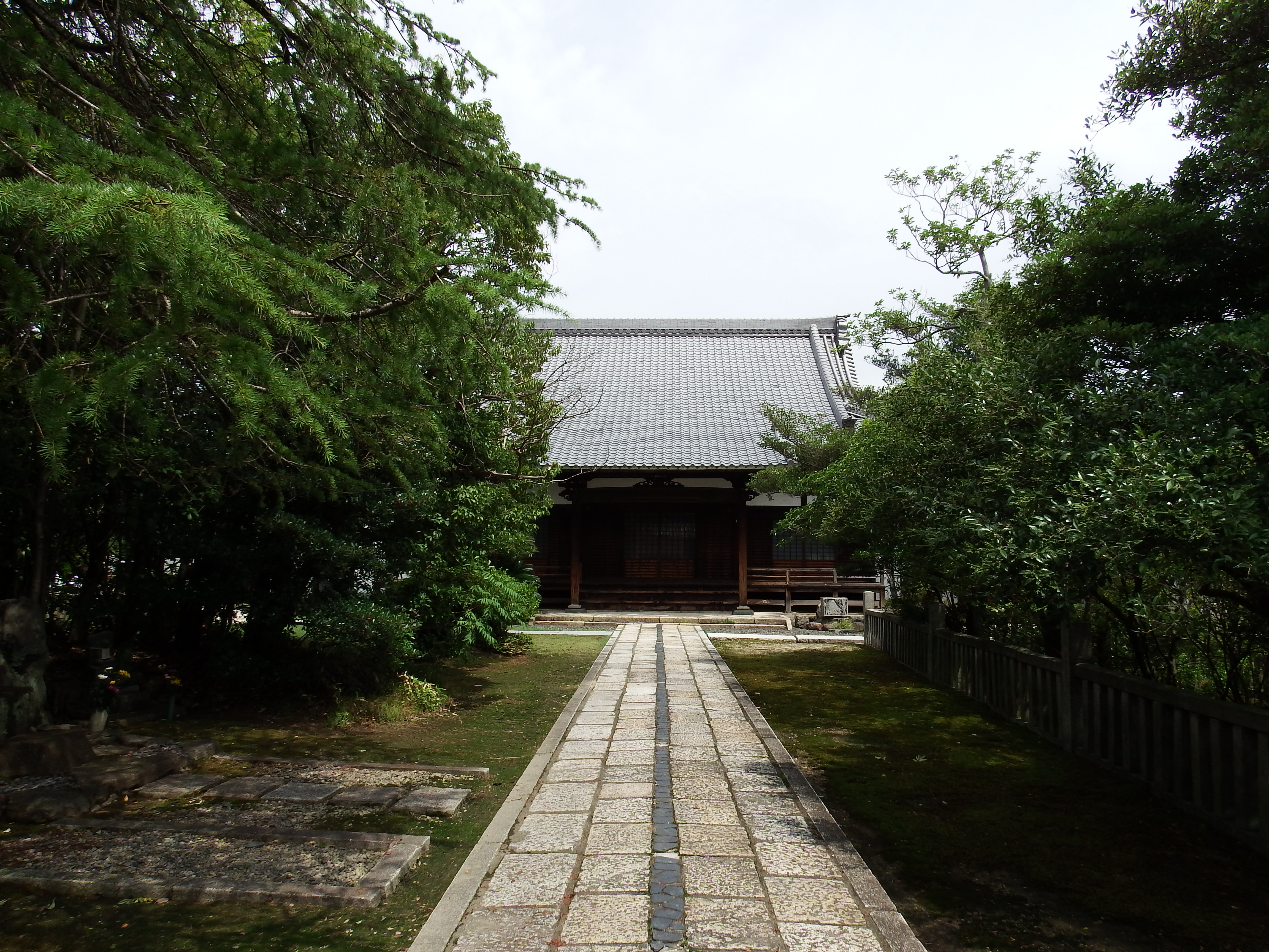 長母寺本堂